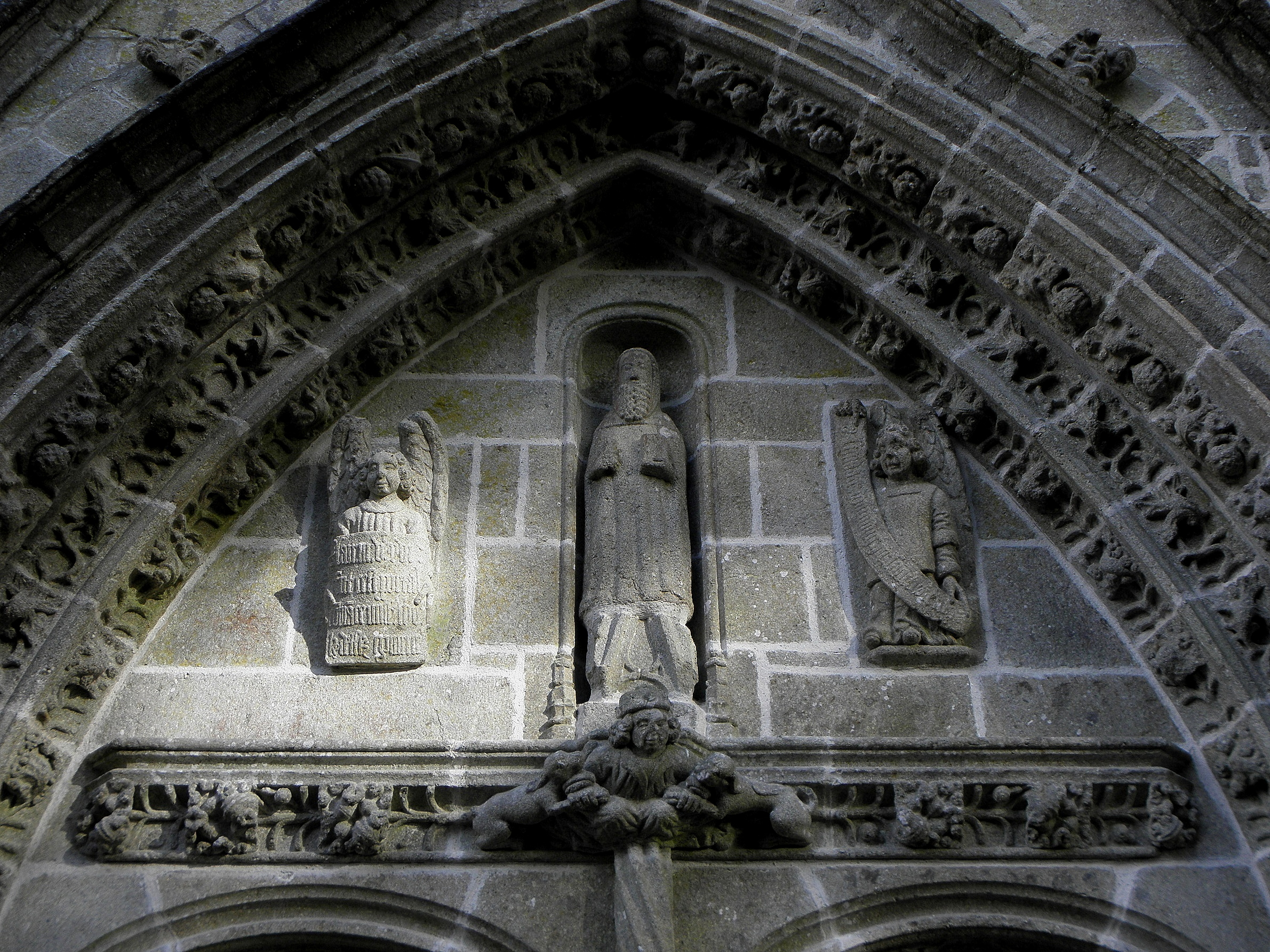 Façade ouest de la chapelle Saint-Herbot en Plonévez-du-Faou (29).